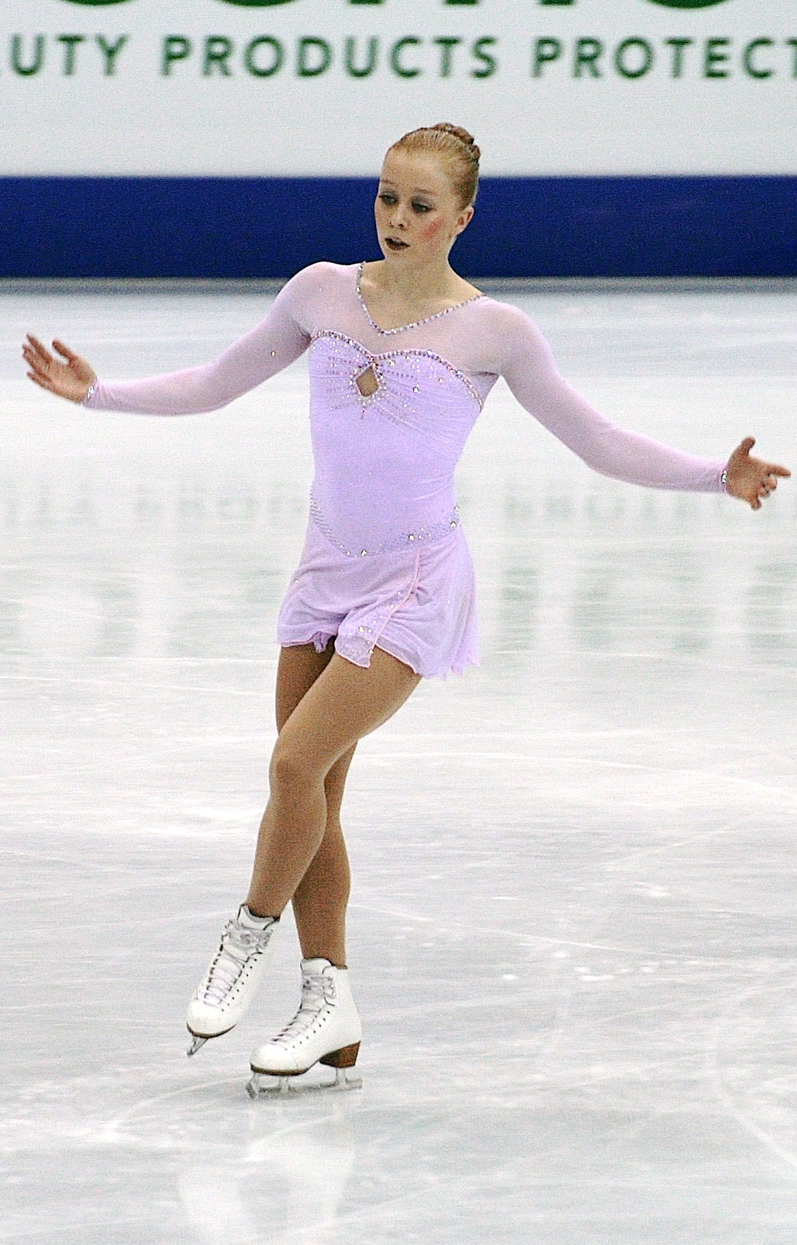 Анине Рабе (Норвегия) на чемпионате мира по фигурному катанию 2012.